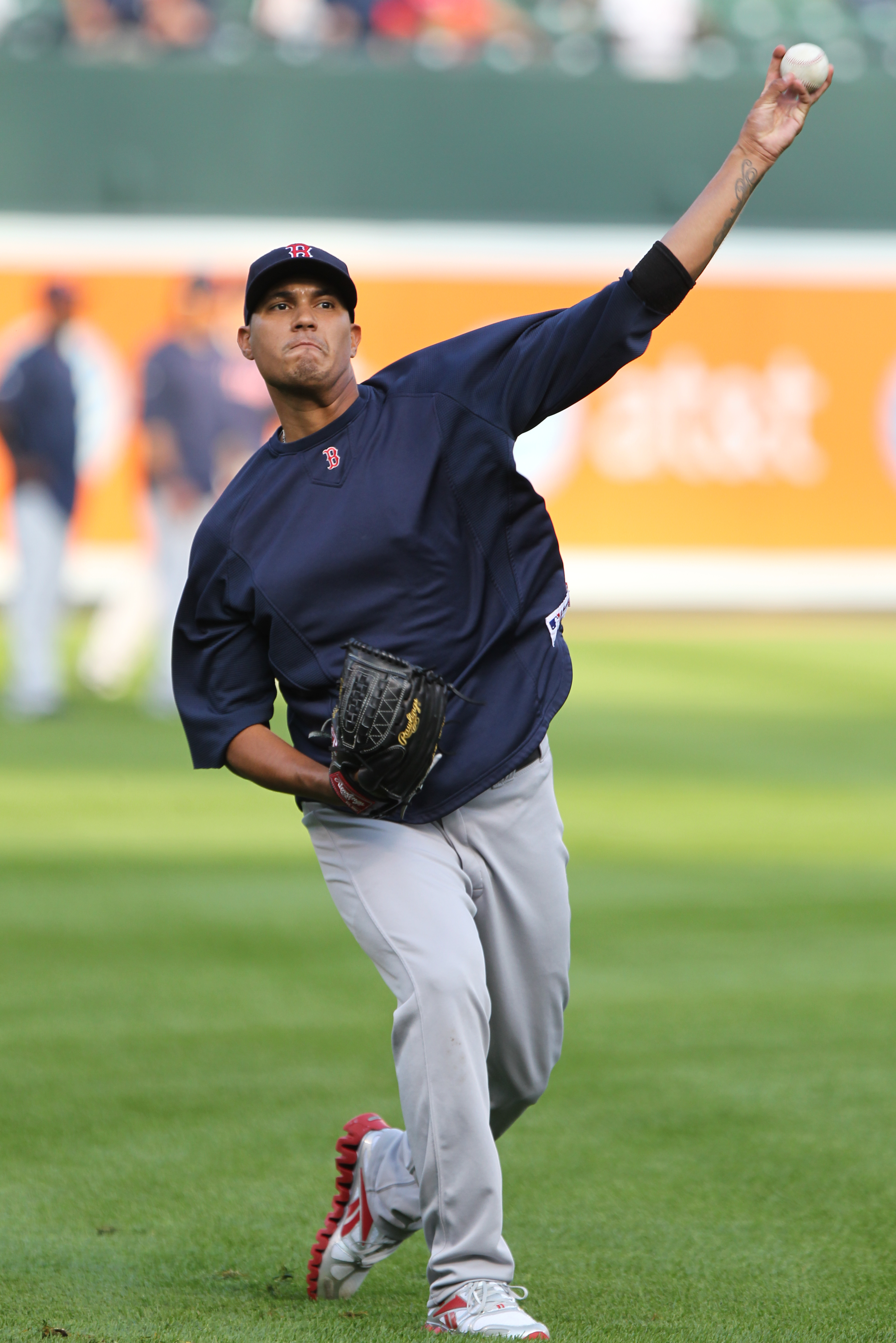 Félix Doubront